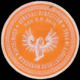 Siegelmarke der General-Direction der Böhmischen Nordbahn in Prag